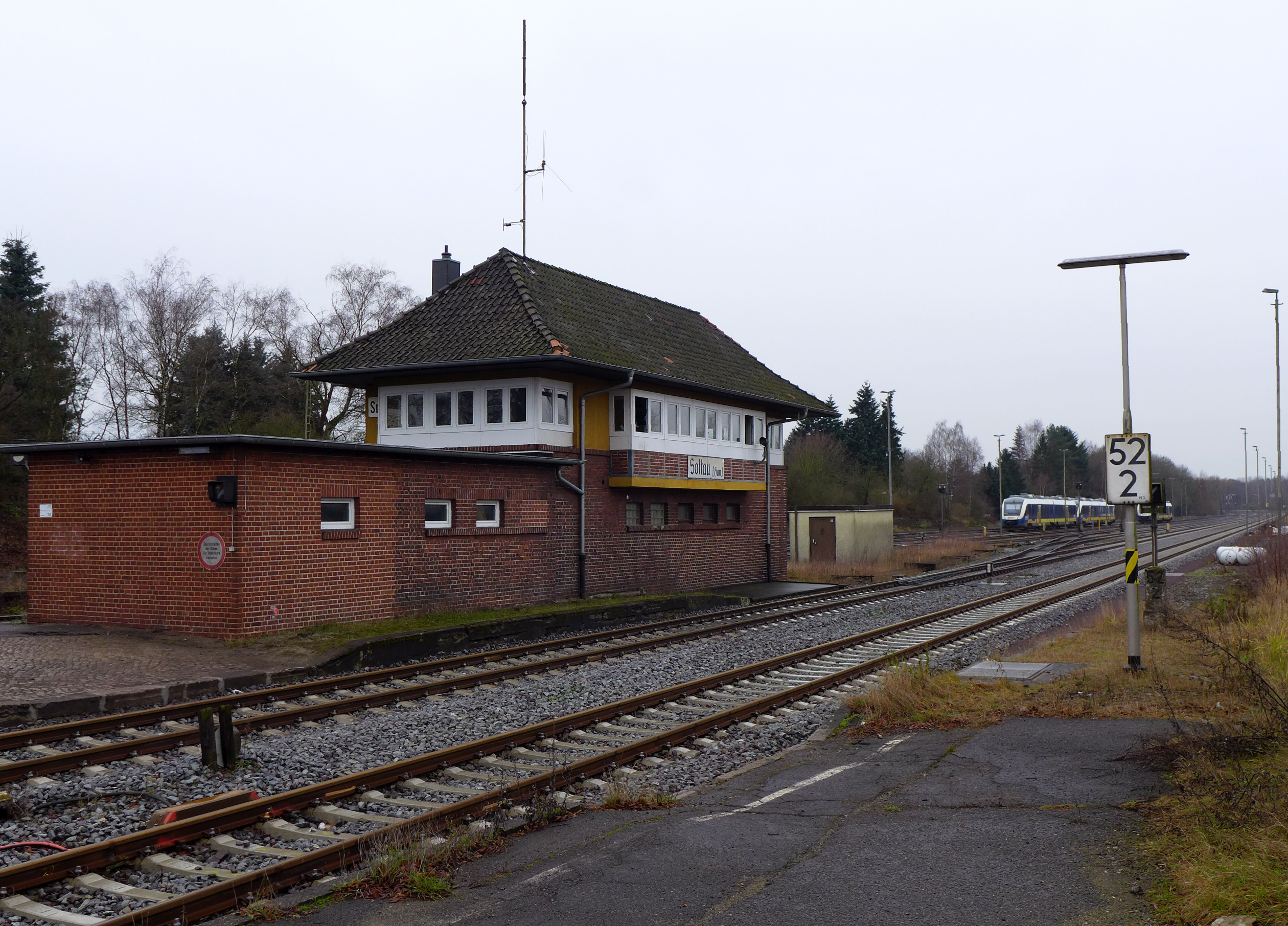 Signal box/Stellwerk auf dem Bahnhof Soltau (Han).